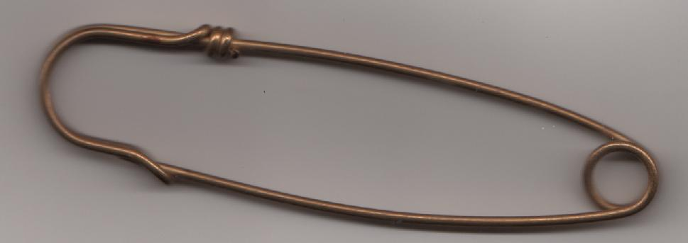 Эта булавка изготовлена на Каменск-Уральском заводе обработки цветных металлов.